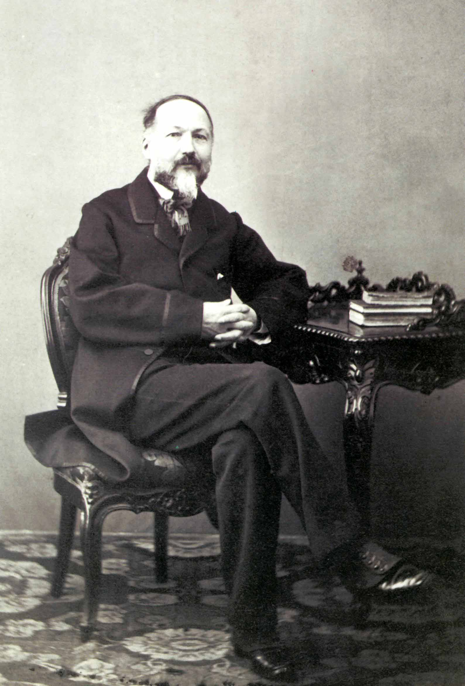 autore sconosciuto, riproduzione da fotografia originale, Ritratto di Felice le Monnier, opera il cui autore è morto da più di 70 anni, , acquisita da scanner